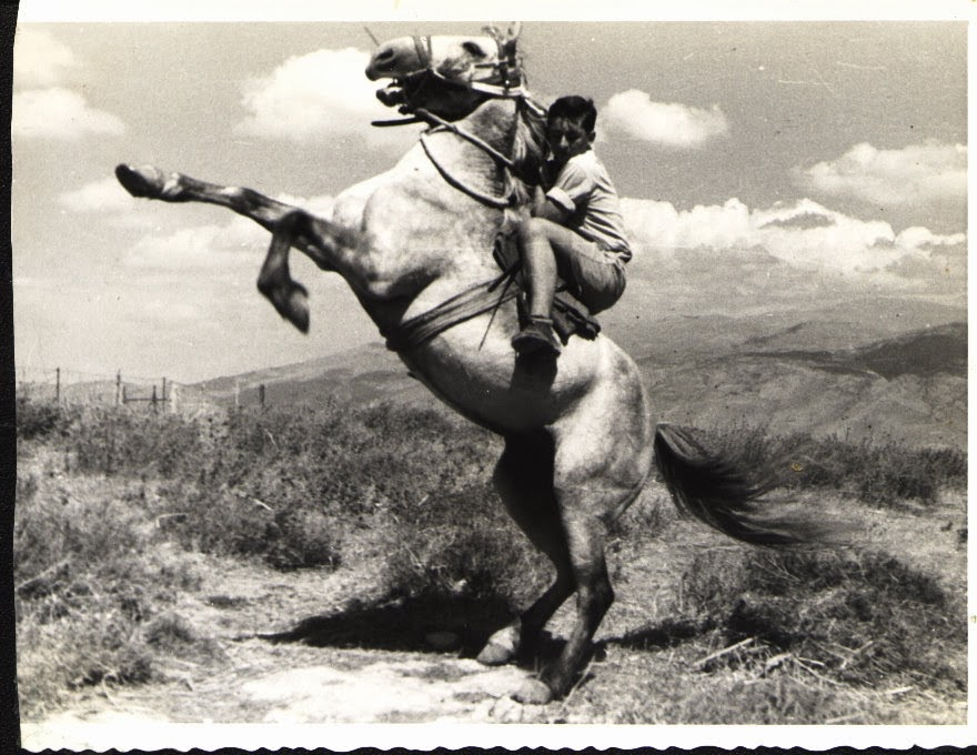 עפר בן דוד על סוסה, כפר גלעדי, שנות הארבעים